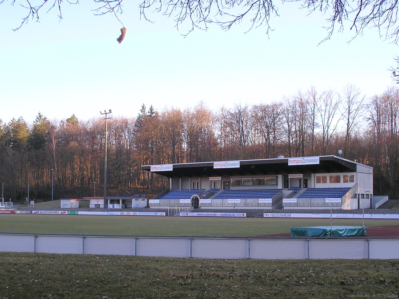 Haupttribüne im Albstadion Heidenheim an der Brenz